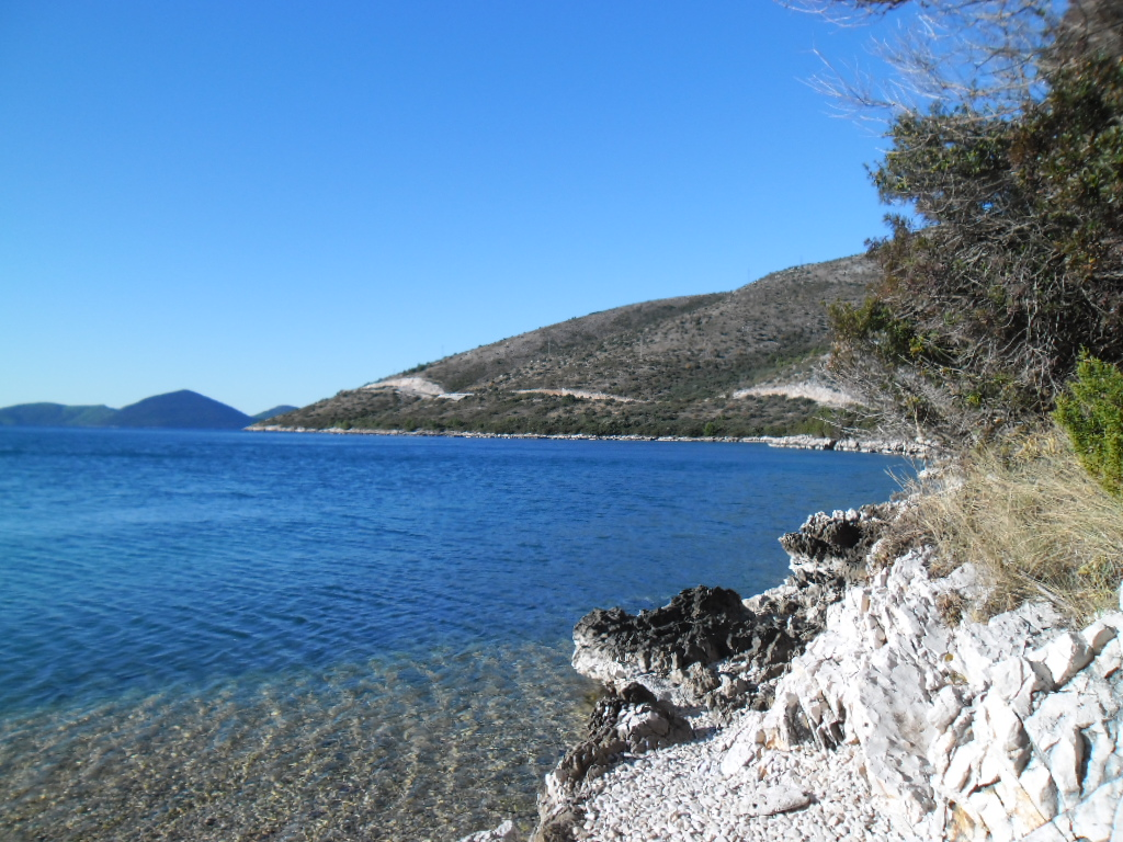 obala Budime, Banići